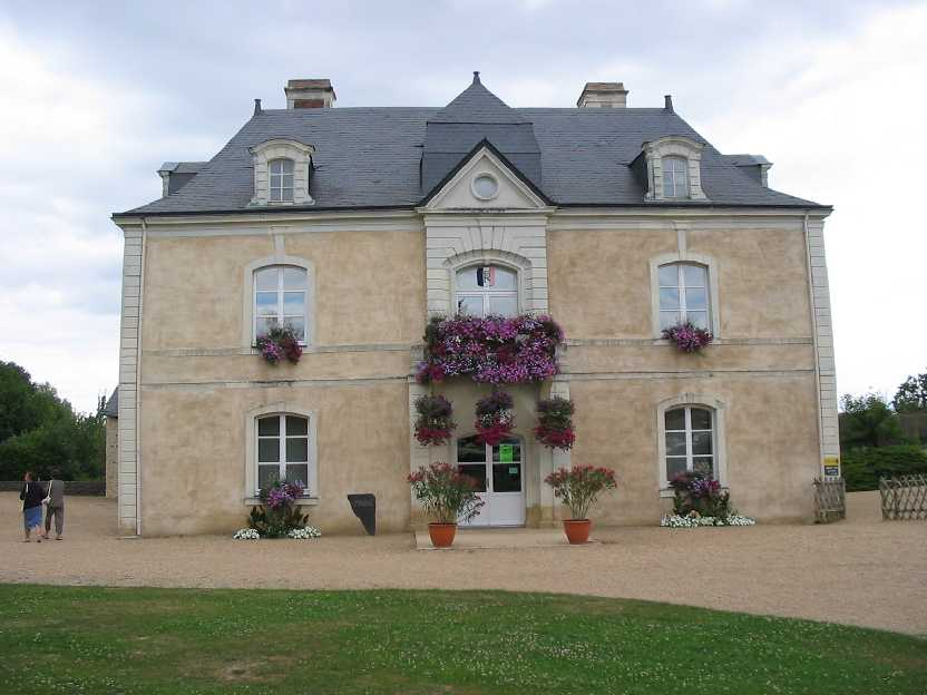 ancienne cure, façade sud, actuellement mairie de Brain-sur-Longuenée (49)